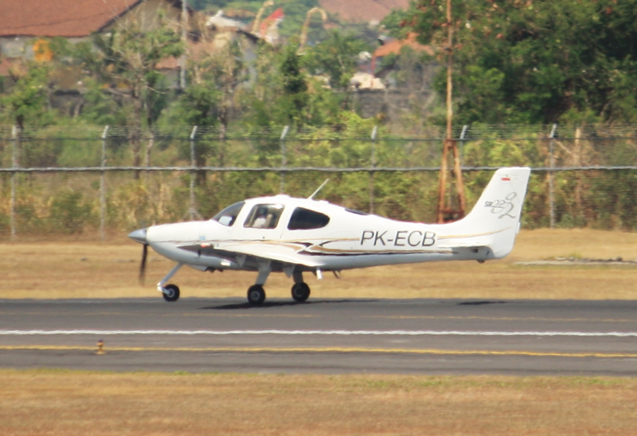 Denpasar / Bali - Ngurah Rai International (DPS / WADD) Indonesia, August 24, 2012.